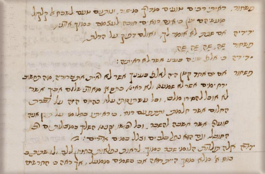 קטע מכתב היד